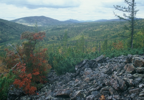 Blick auf das südliche Werchojansk-Gebirge